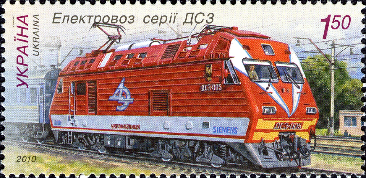 Марка України «Електровоз серії ДС3»